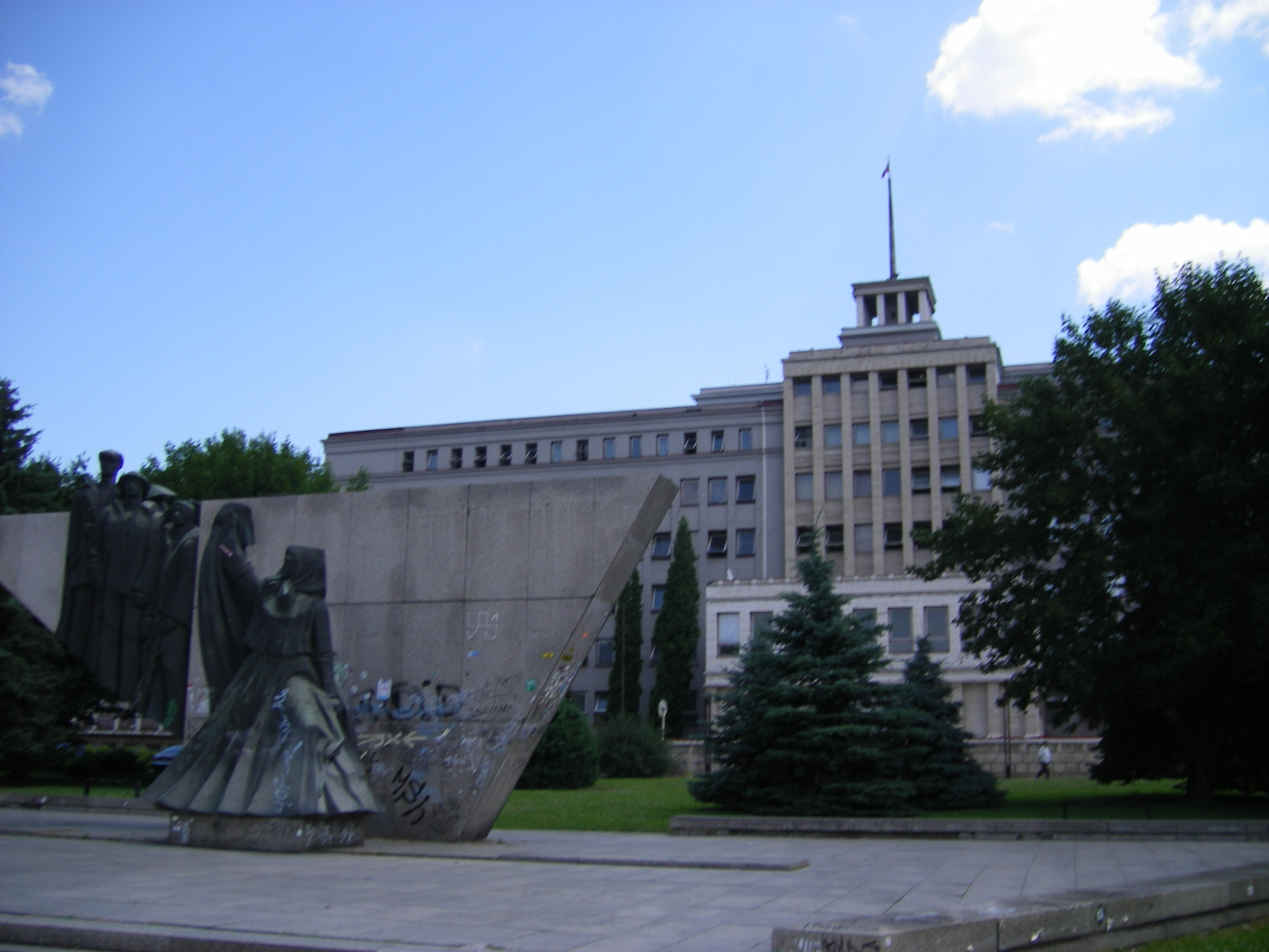 Prešov - krajský úrad